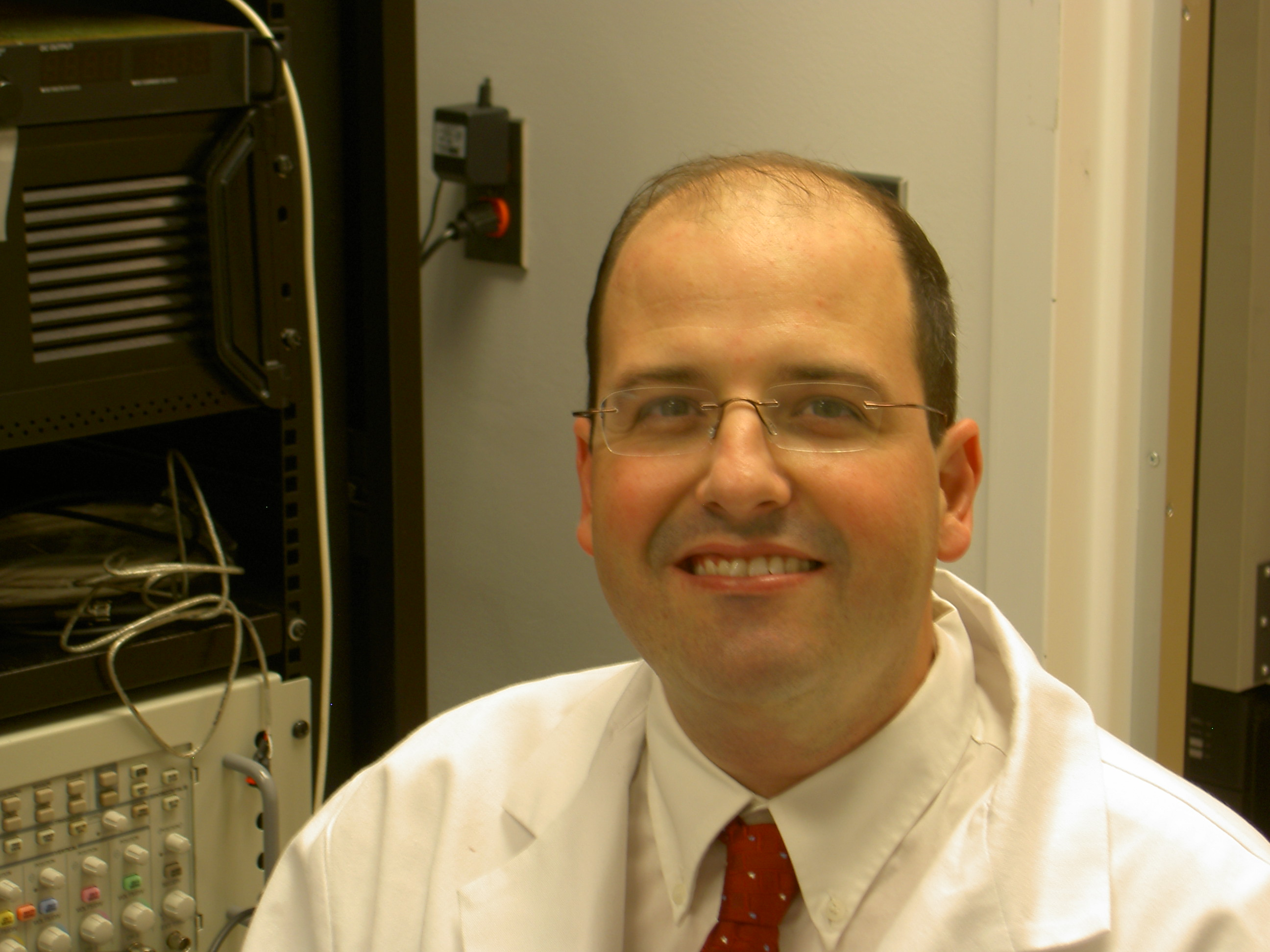 תמונתו של פרופ' ליאור גפשטיין מנהל המערך הקרדיולוגי הקריה הרפואית רמב"ם